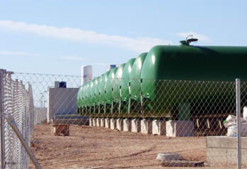 Tanques de la desaladora San Pedro del Pinatar